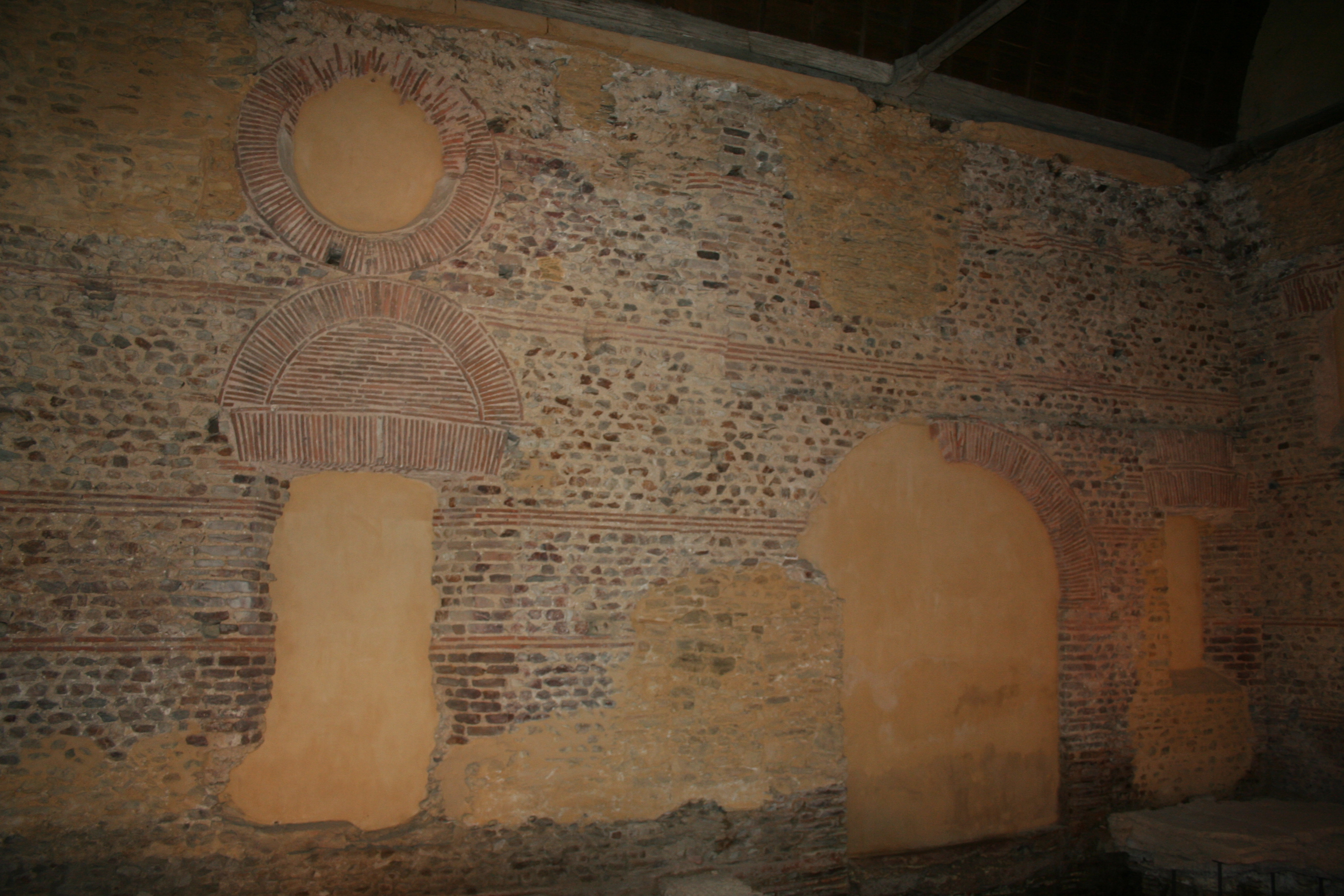 Thermes romains situés dans l'église d'Entrammes, Mayenne.